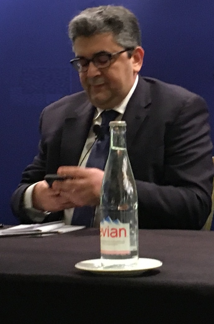 Mohamed Sifaoui, le 1er février 2016